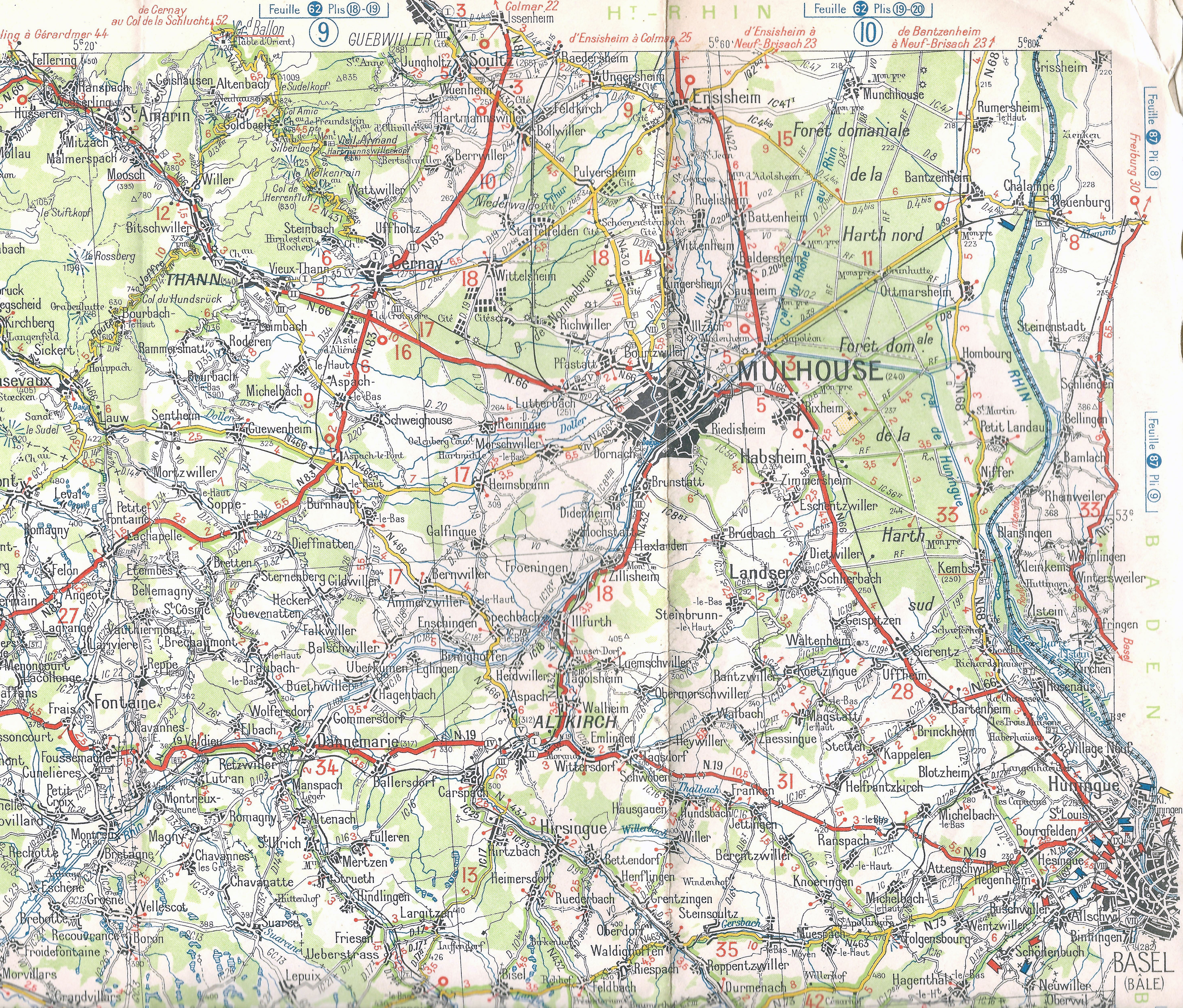 Deel (Mulhouse) van Michelin kaart nr 66 Frankrijk) uitgegeven in 1940. Dit moet voor de Duitse inval van 10 mei 1940 verkocht zijn.